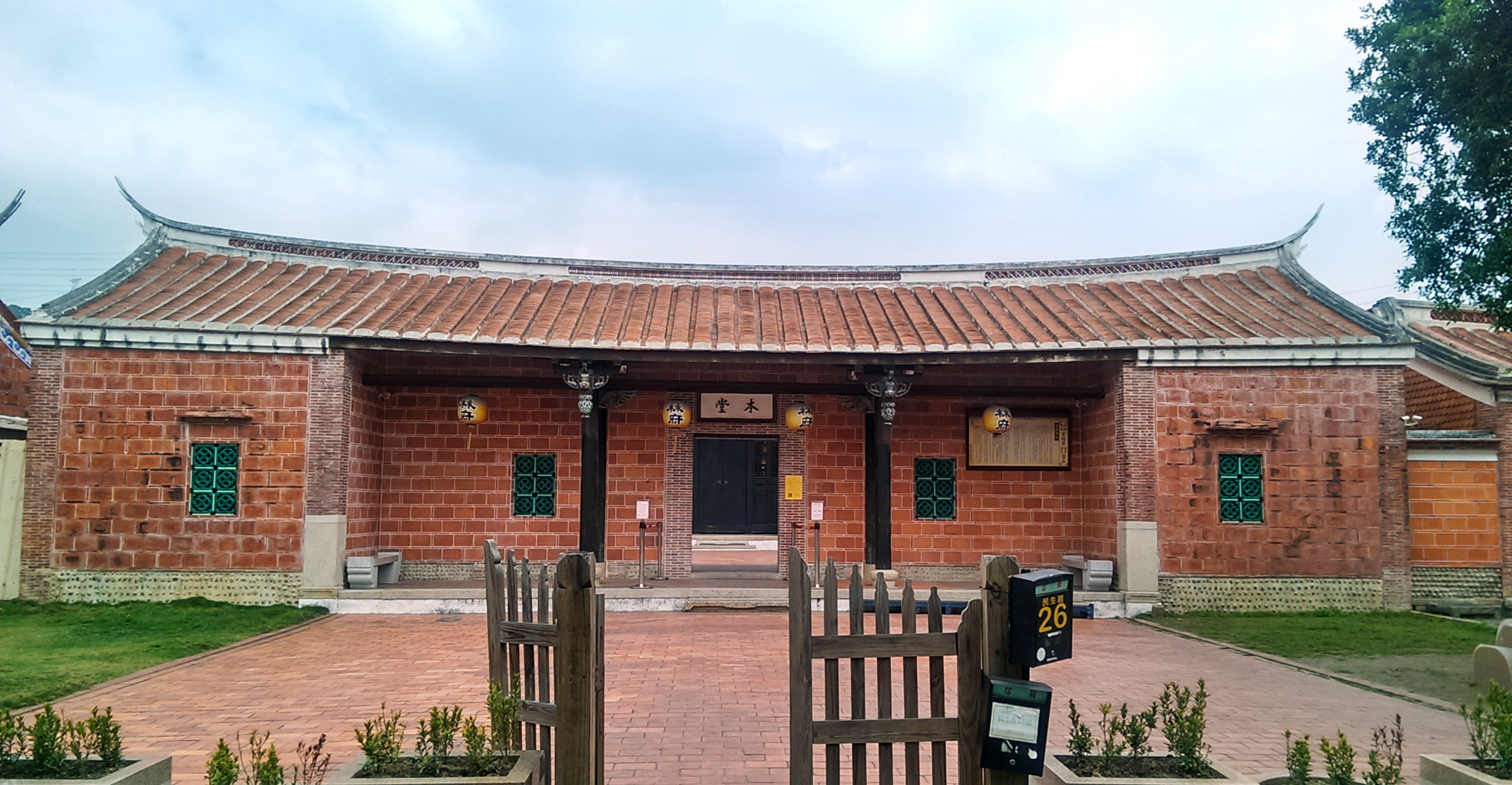 霧峰林家宮保第第一進門廳